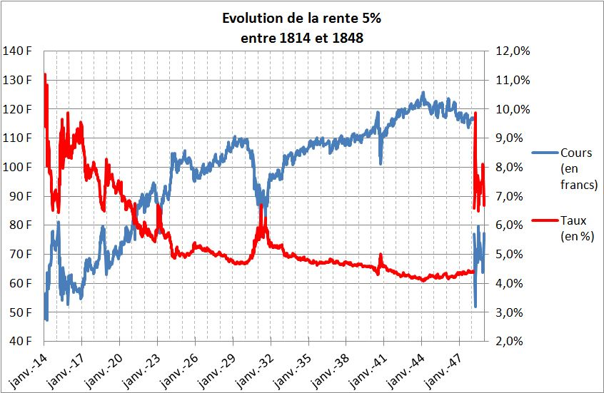 Évolution de la rente 5% de 1814 à 1848.